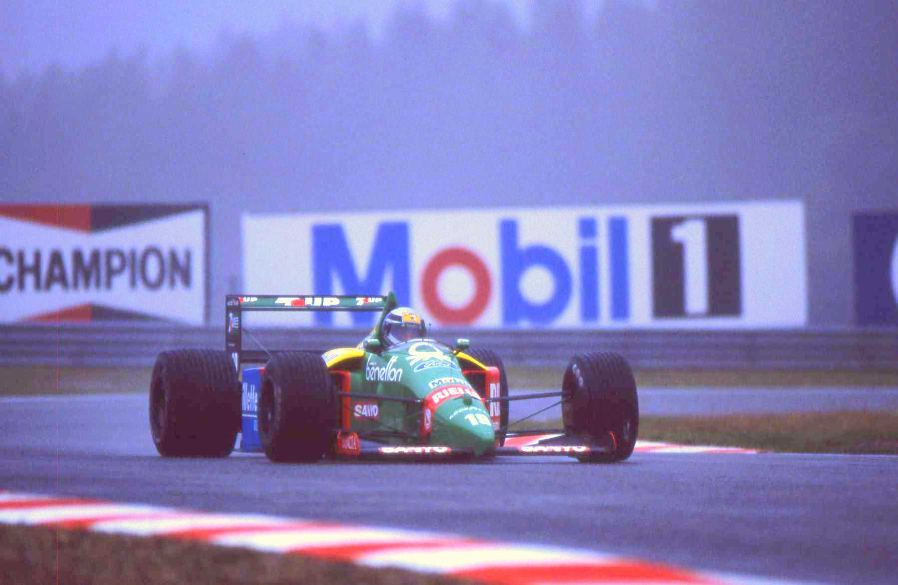 Alessandro Nannini - Benetton-Ford. Scan diapo argentique.